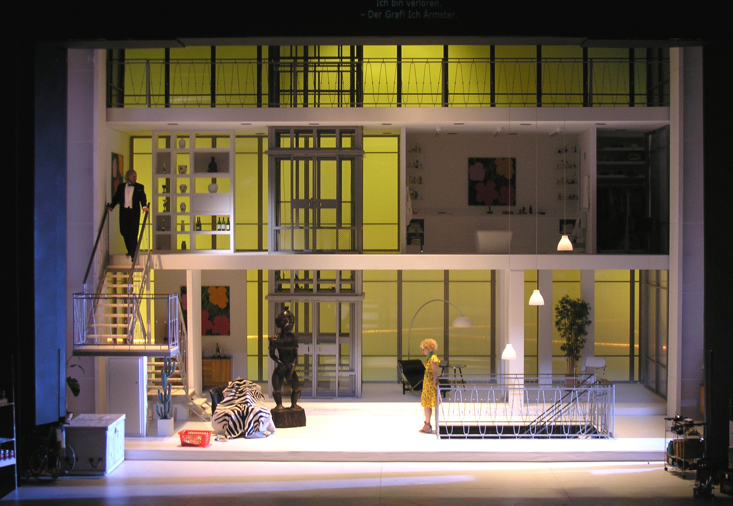 נישואי פיגרו, במאית אינגה לבנט, מעצב תפאורה רוני תורן, מעצבת תלבושות מגלי גרברון, מעצב תאורה פטר מולר, אופרה סארברוקן, גרמניה, 2009